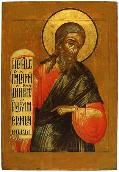 Пророк Иоиль. Пророческий чин из главного иконостаса ц. Иоанна Златоуста в Коровниках в Ярославле. Ок. 1654 г. Ярославский историко-архитектурный и художественный музей заповедник, Ярославль, Россия